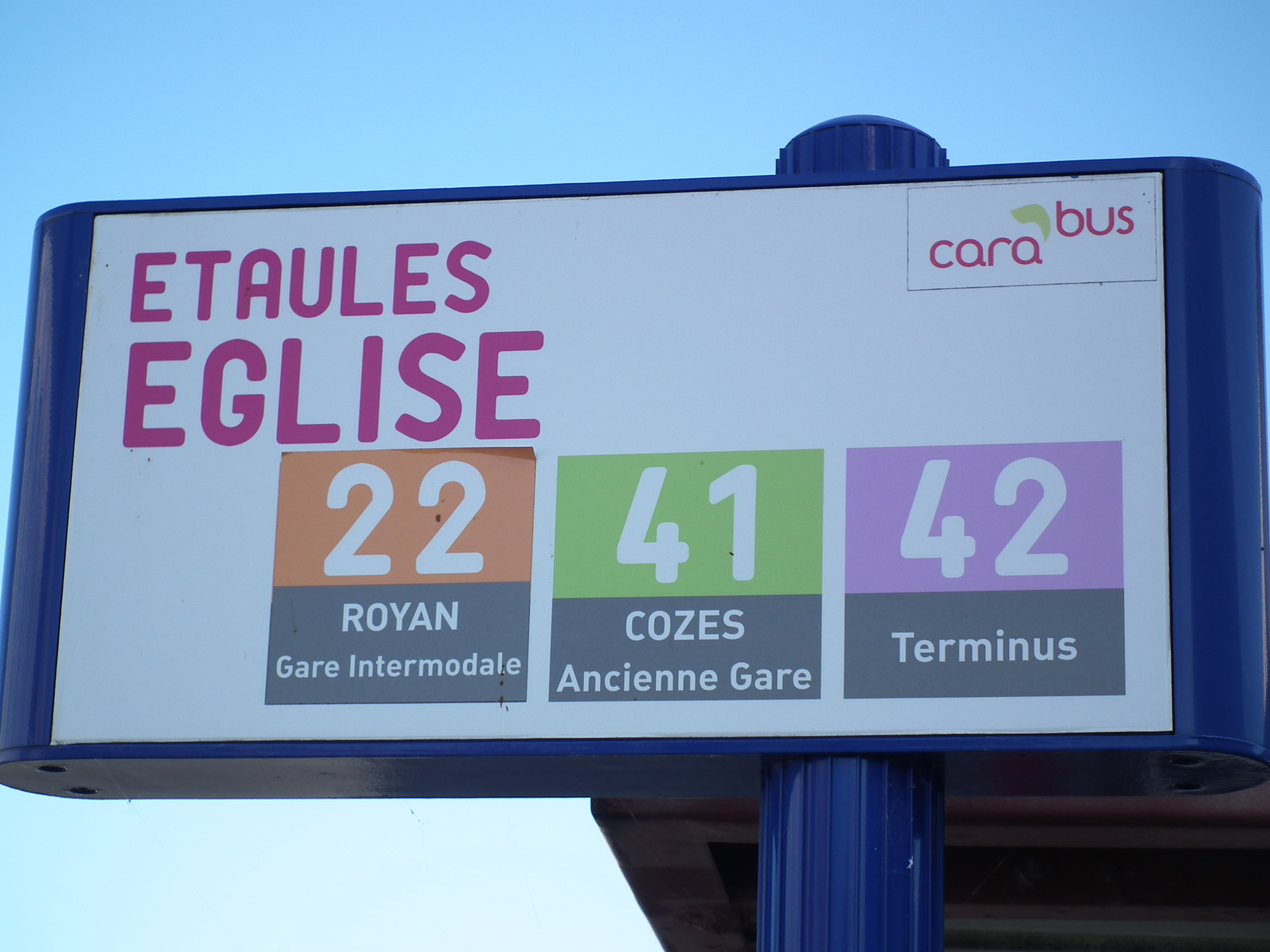 Une des stations de bus d'Etaules